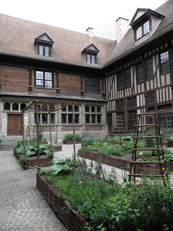 Cour intérieure de l'Hôtel de Mauroy à Troyes (10). .